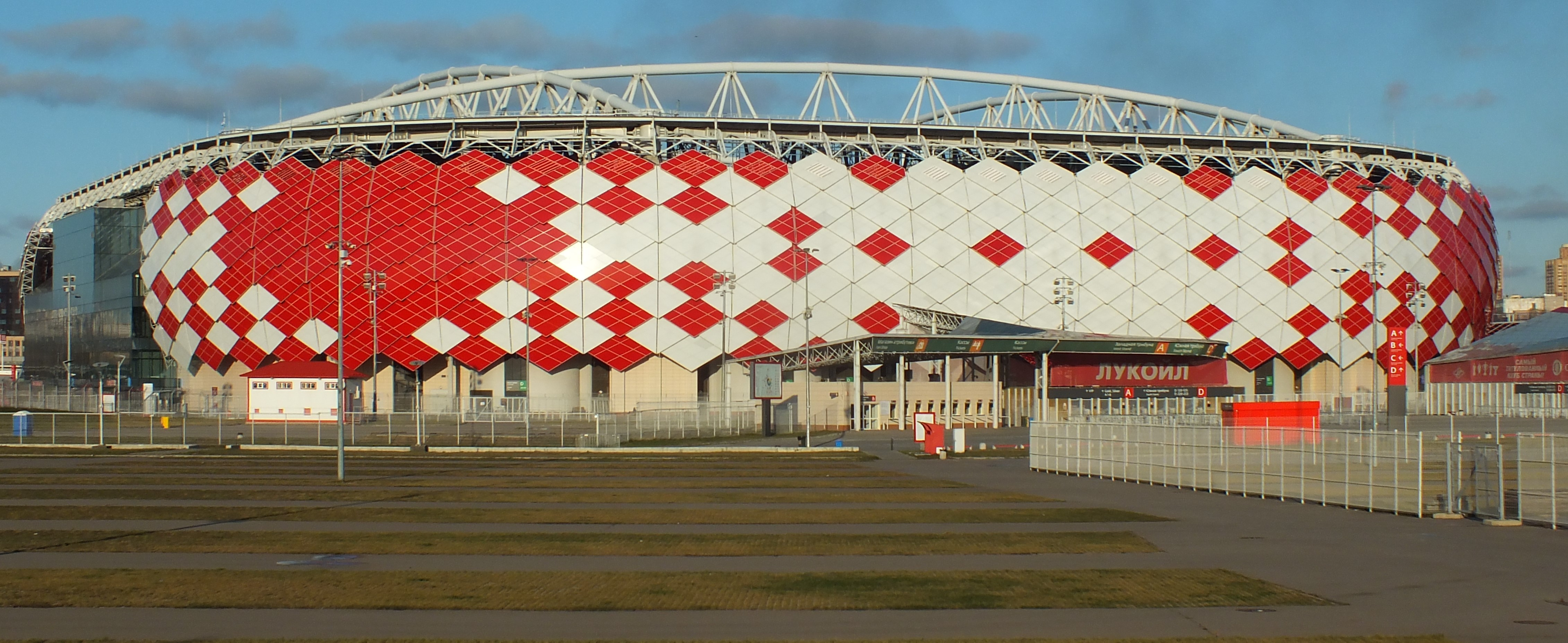 Южная сторона московского стадиона «Открытие Арена». Вход на западную трибуну A и южную трибуну D. На заднем фоне произошёл небольшой пожар, поэтому верхнюю часть фотографии с голубым небом (в декабре!) вынужден был обрезать. Погода 1 декабря 2019 года была отличная, а МЦД работал в бесплатном режиме, поэтому добрался по МЦД-2 до станции «Тушино», а потом и до стадиона.